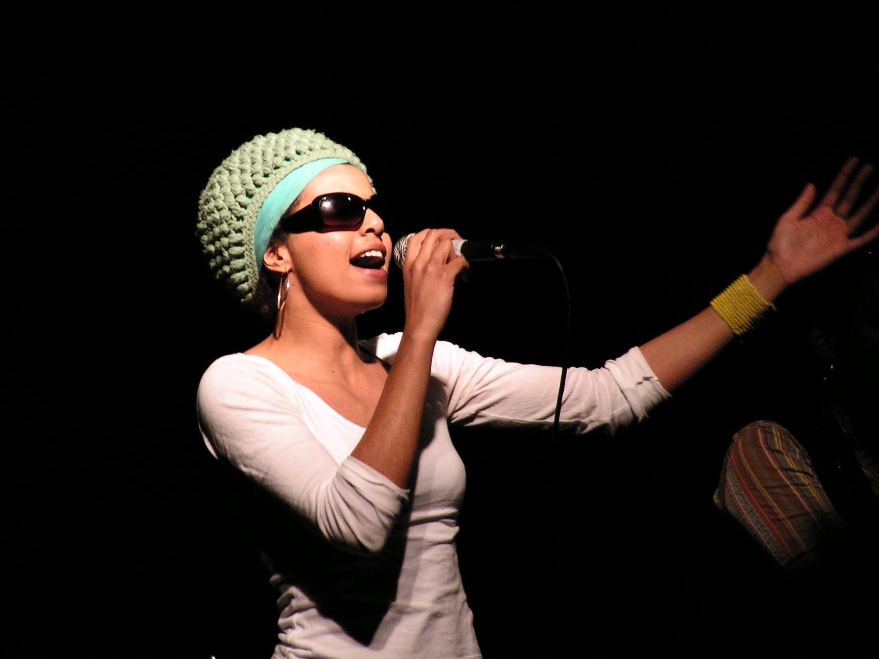 Singer Mamadee in Milano, 15 March 2007